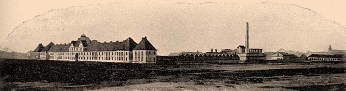 A Magyar Pamutipar Rt gyártelepe